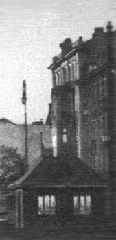 Juliusz Ostrowski tenement house in Warsaw